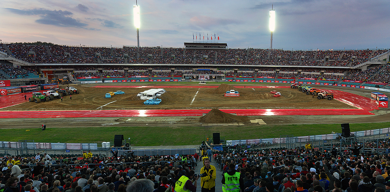 Orlen Monster Jam w Chorzowie na Stadionie Śląskim. Panorama na stadion.